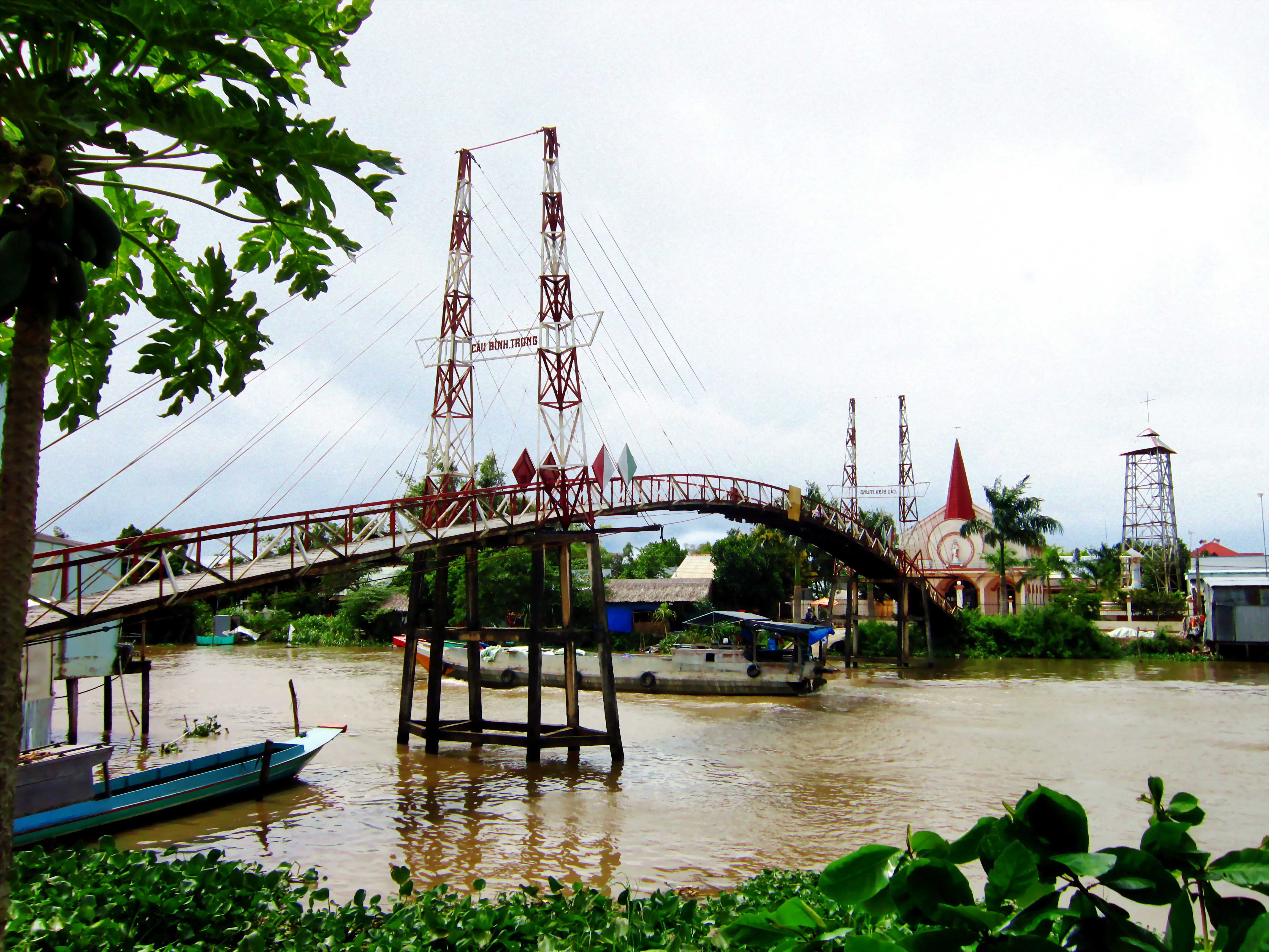 Cầu sắt ở khu vực chợ Mỹ Hiệp Sơn, bắc qua kênh Thoại Hà, dẫn sang nhà thờ ở xã Mỹ Hiệp Sơn (Hòn Đất, Kiên Giang, Việt Nam).